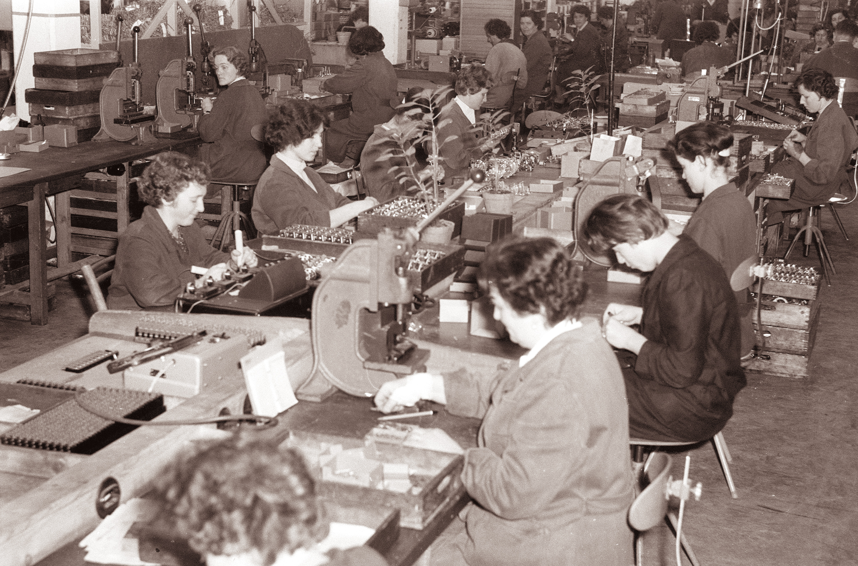 Iskrina tovarna v Kranju